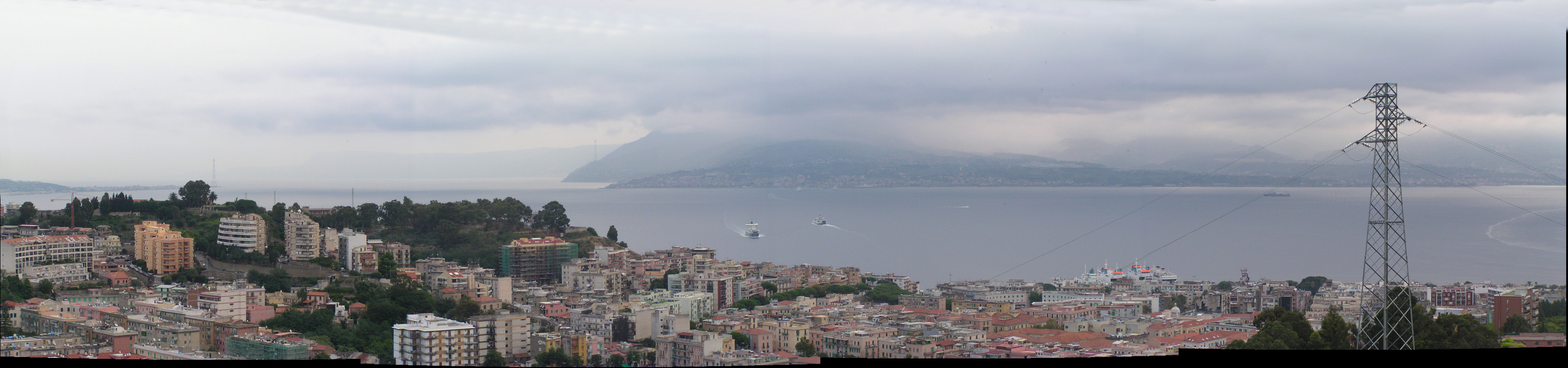 Strasse von Messina